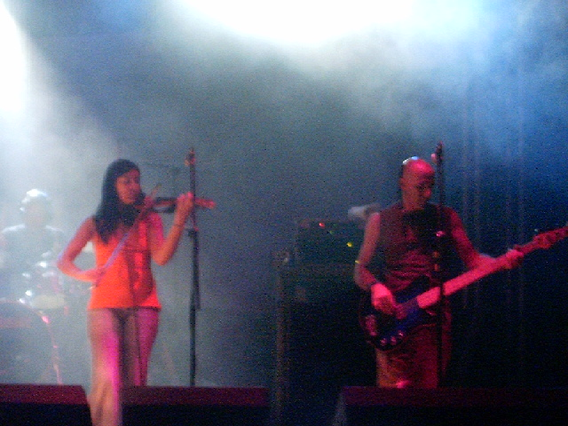 Quinta do Bill em concerto a 2 de Julho de 2005, em Escudeiros, Braga